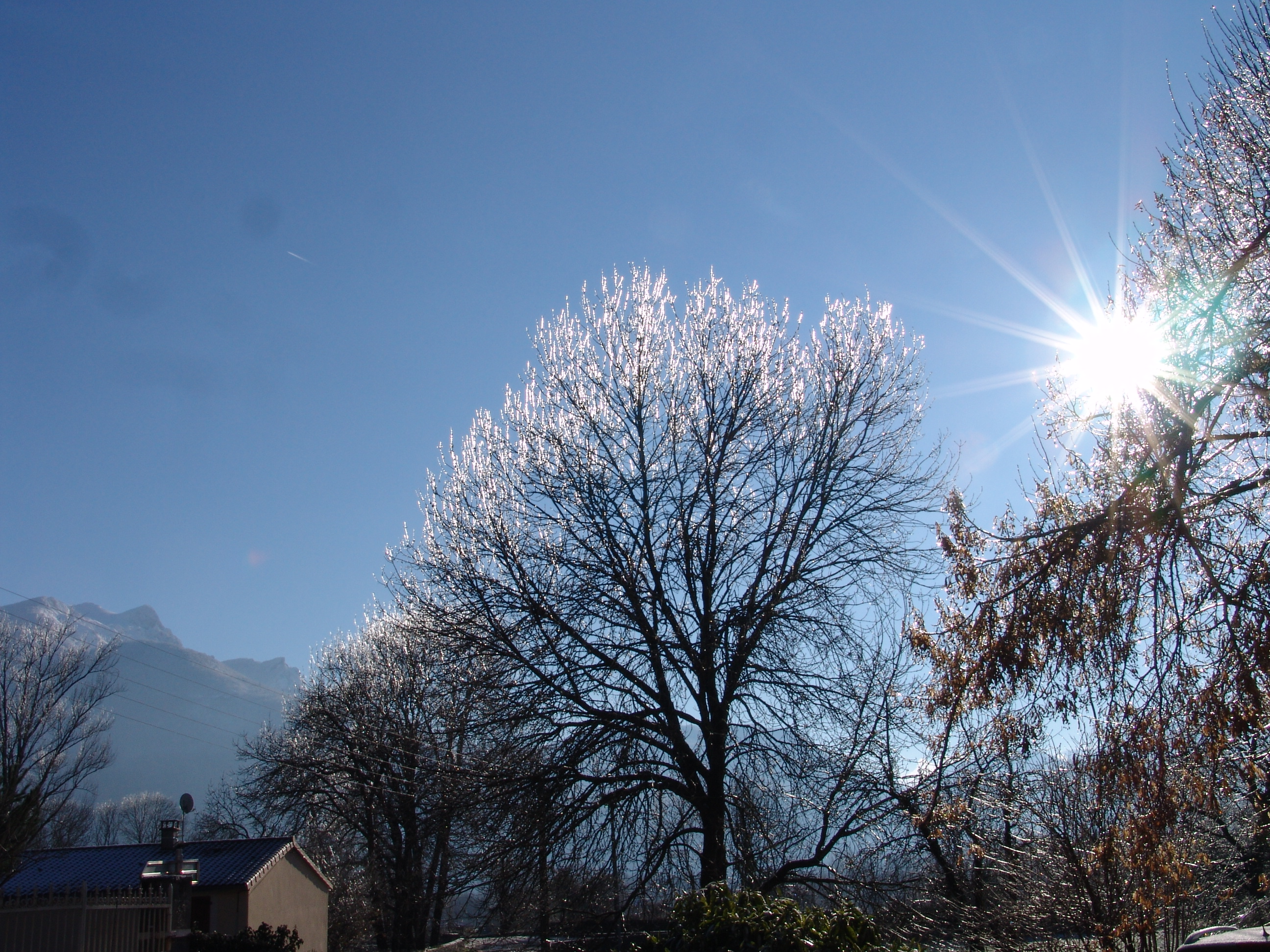 Le pic du Gar vu de Sainte-Marie de Barousse. Ciel d'hiver avec chandelles de glace dans les arbres.